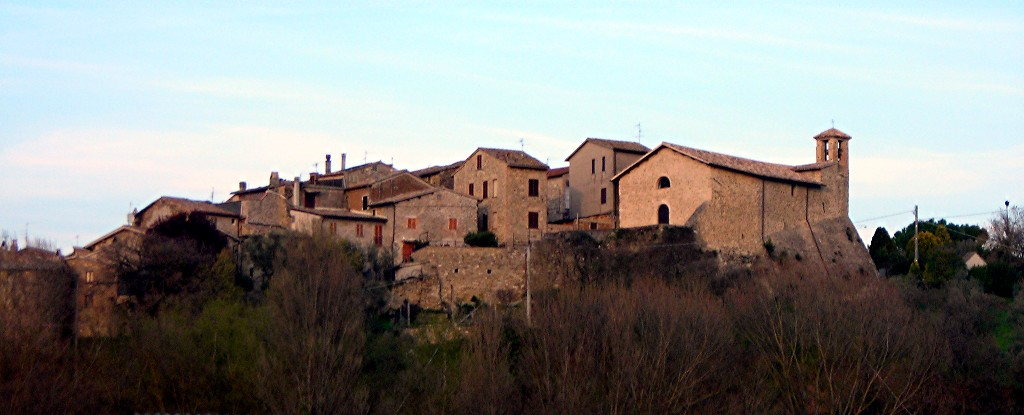 Torre del Colle, Bevagna, Perugia, Umbria, Italy